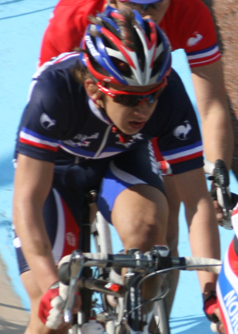 Bryan Coquard à l'arrivée du Paris-Roubaix juniors 2010